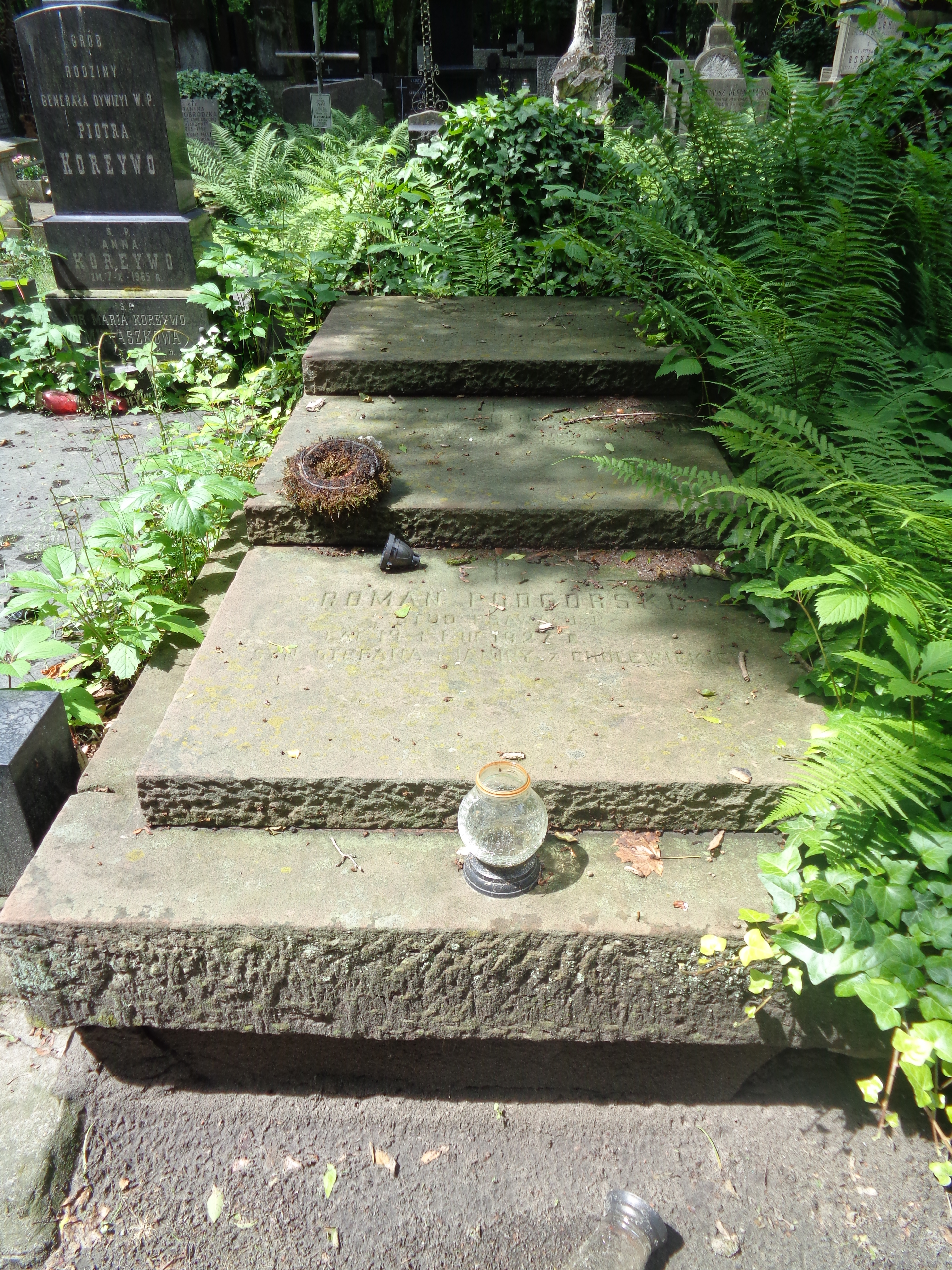 Grób Romana Cholewickiego na Cmentarzu Powązkowskim